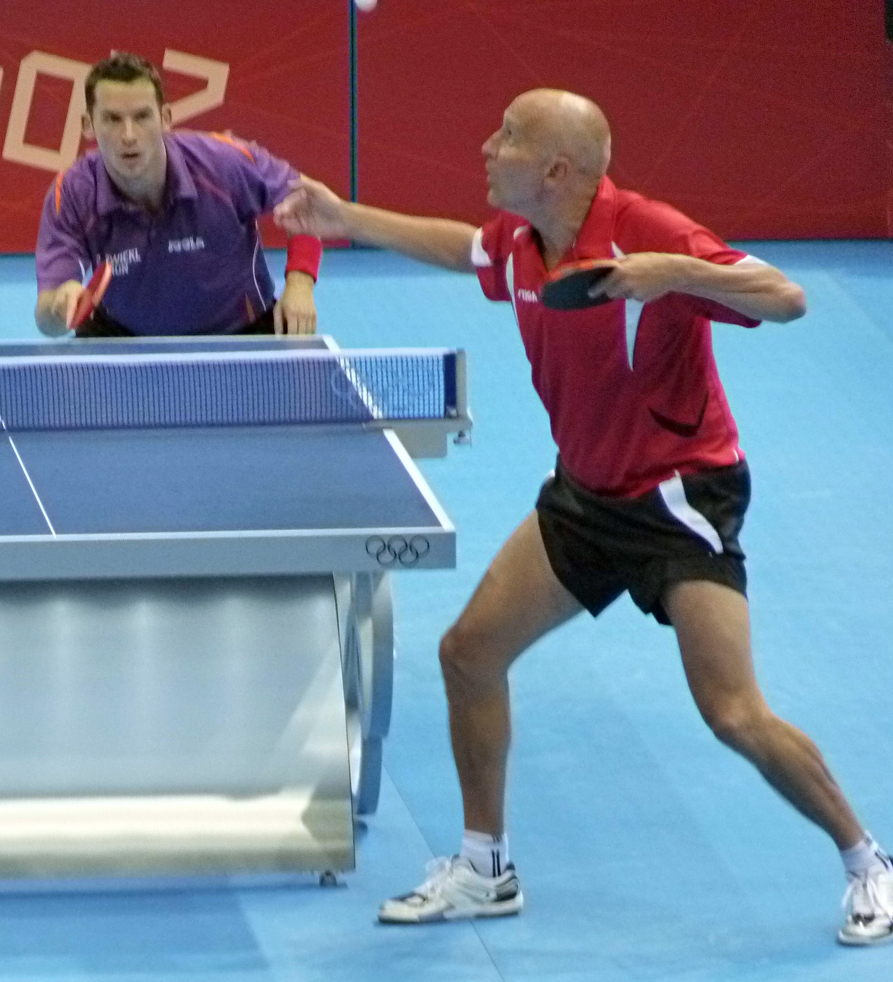 Allan Bentsen (til højre) spiller mod Daniel Zwickl i første runde af bordtennisturneringen ved Sommer-OL 2012 i London